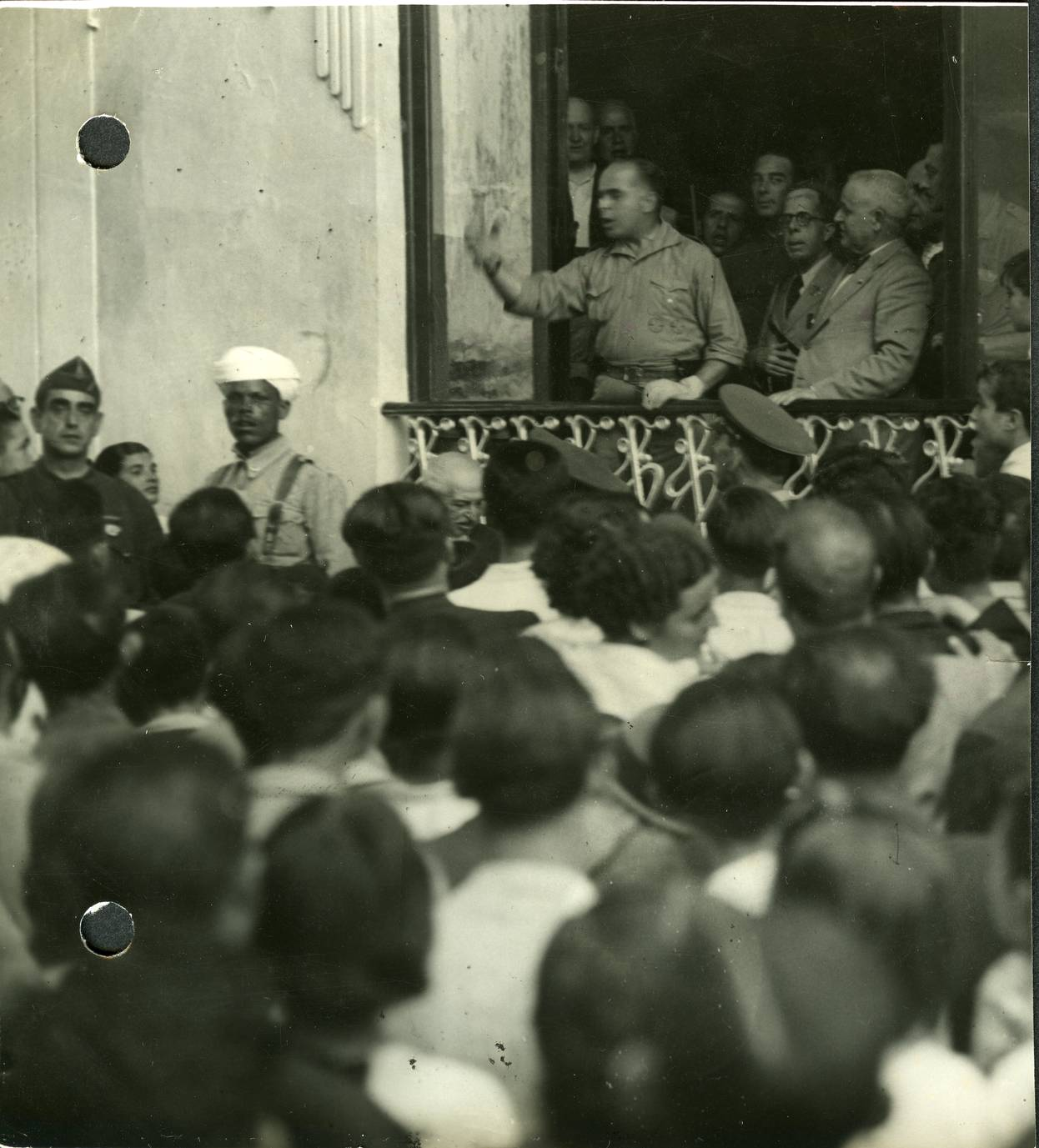 Fotografia del General Varela en actitud de arenga o discurso a un grupo de militares y civiles